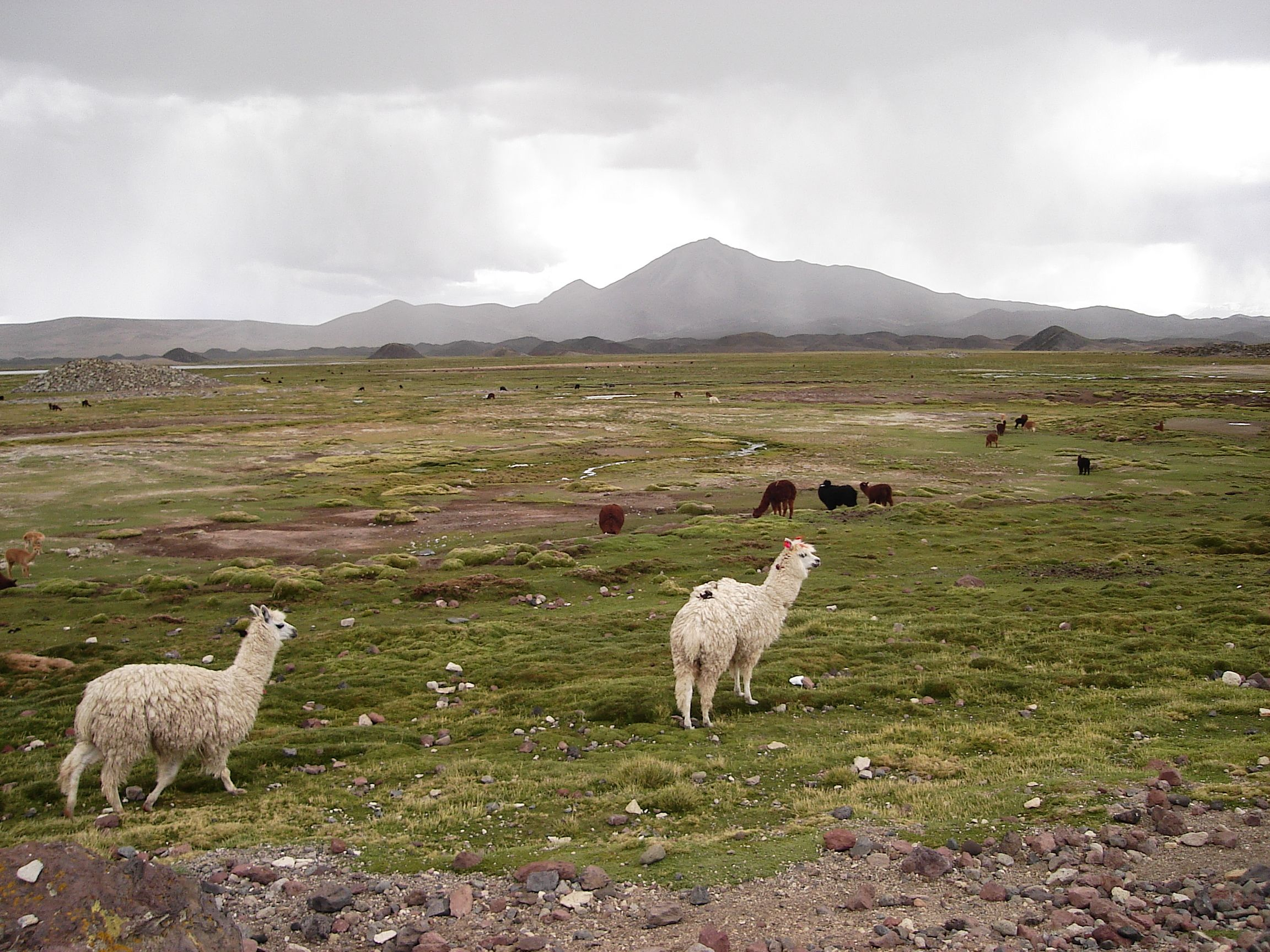 Foto tirada por mim, em Arica.